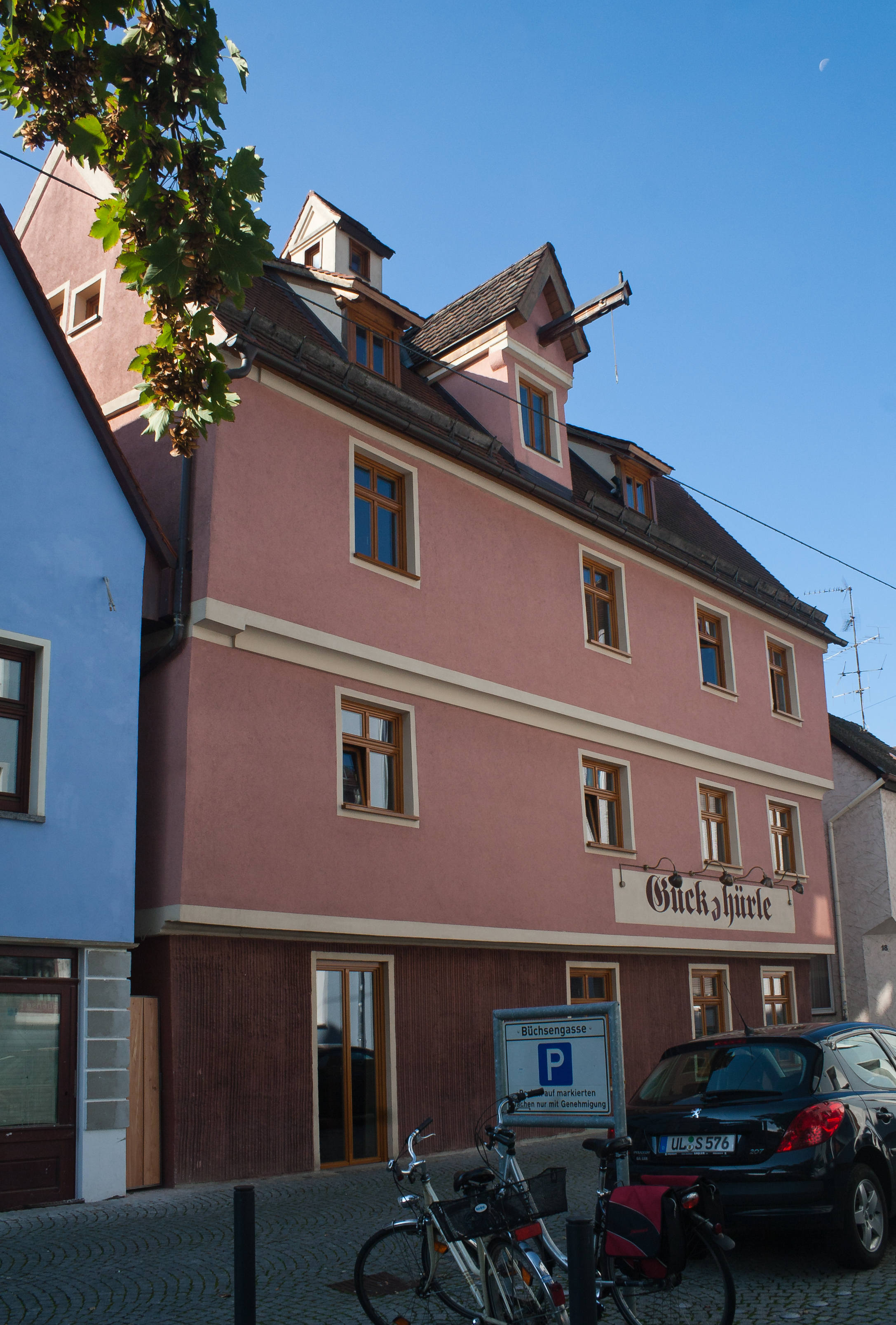 Ulm, Baden-Württemberg, Germany